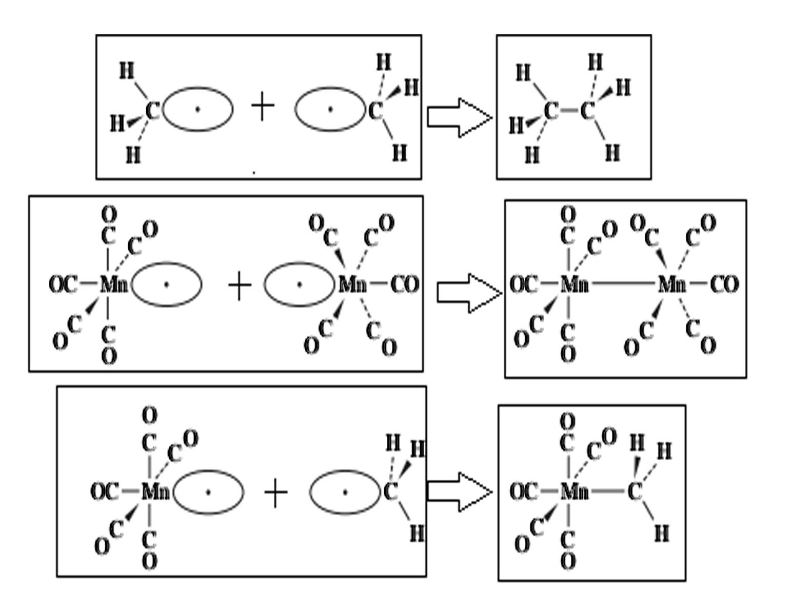 Figura 8.2: Formación de H3Ci Mn(CO)5 a partir de Etano y (OC)5Mni Mn(CO)5